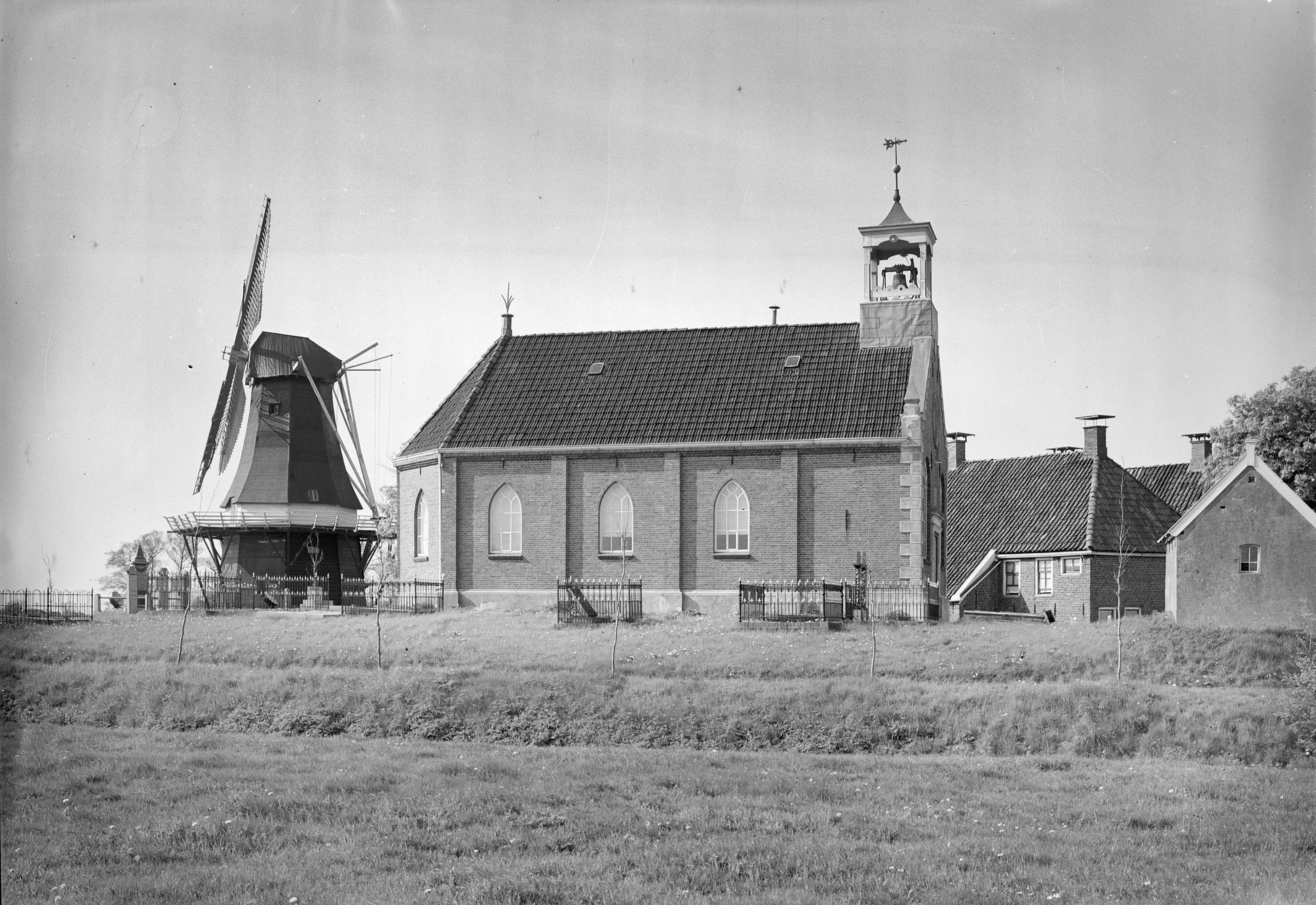 N.H.Kerk: Aanzicht noordzijde van de kerk met links de molen